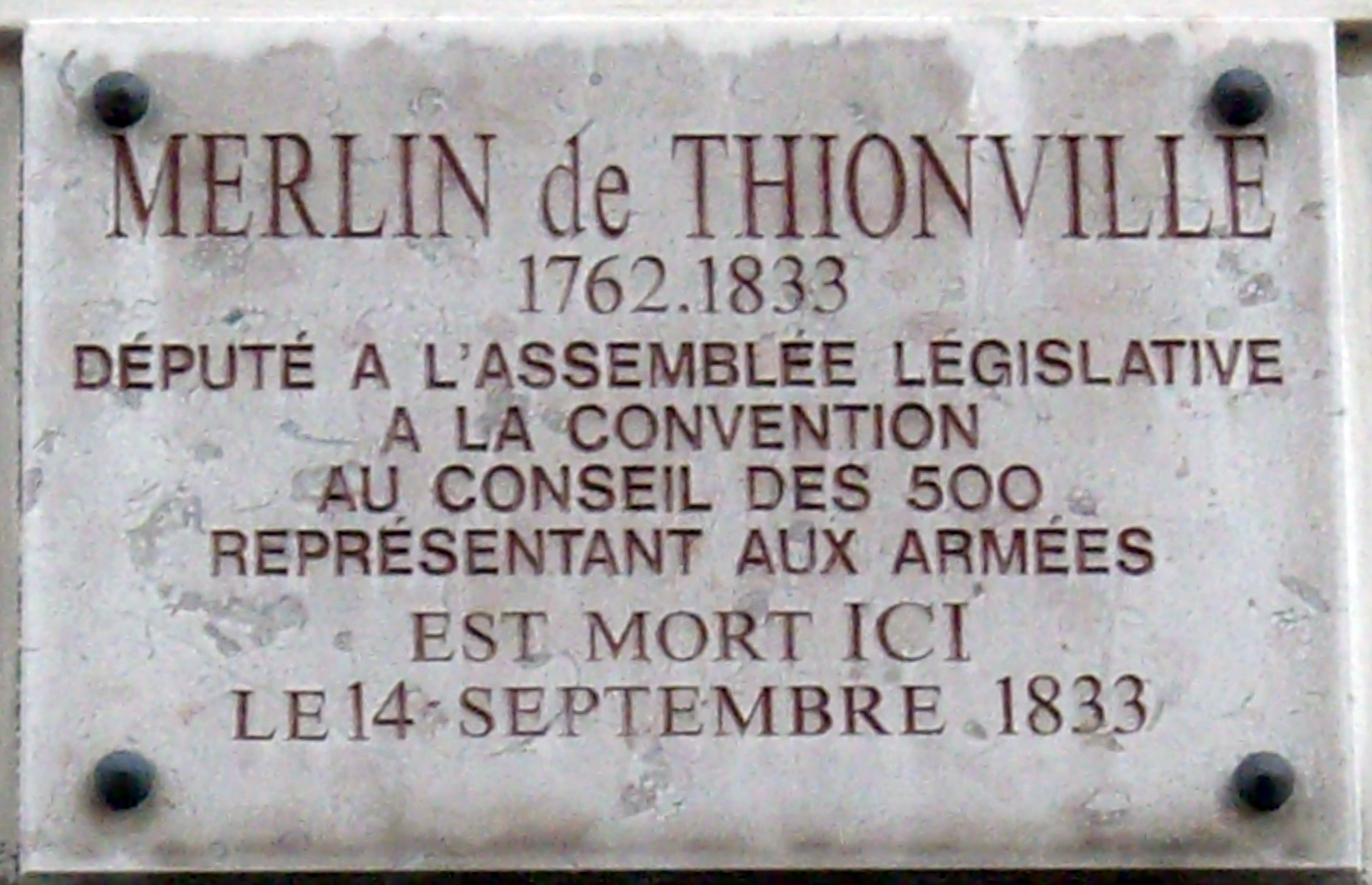 Plaque apposée au n° 58 de la rue des Tournelles, Paris 3e. « Merlin de Thionville, 1762-1833, député à l'Assemblée législative, à la Convention, au Conseil des 500, représentant aux Armées, est mort ici le 14 septembre 1833. »